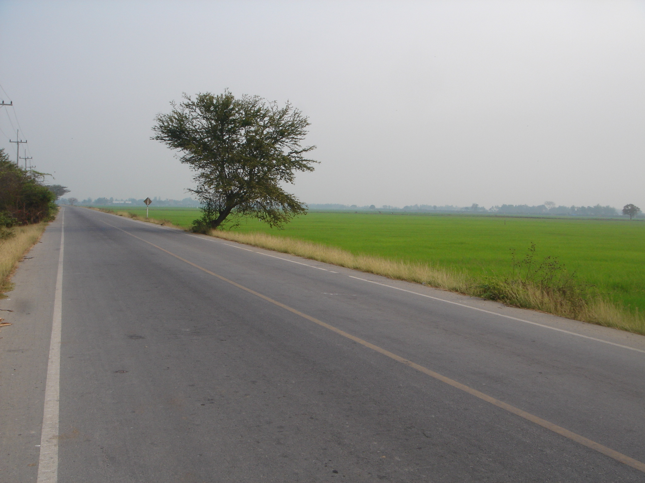 ทางหลวงชนบท มุ่งสู่บ้านคณฑี อ.อู่ทอง จ.สุพรรณบุรี U-Thong district.